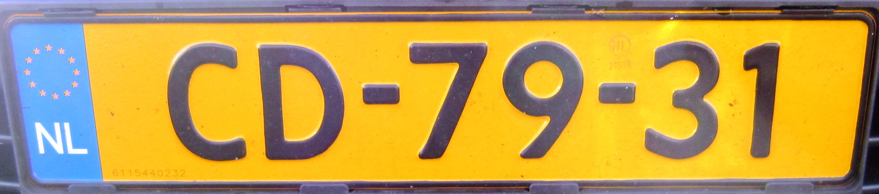 CD kentekenplaat Nederland